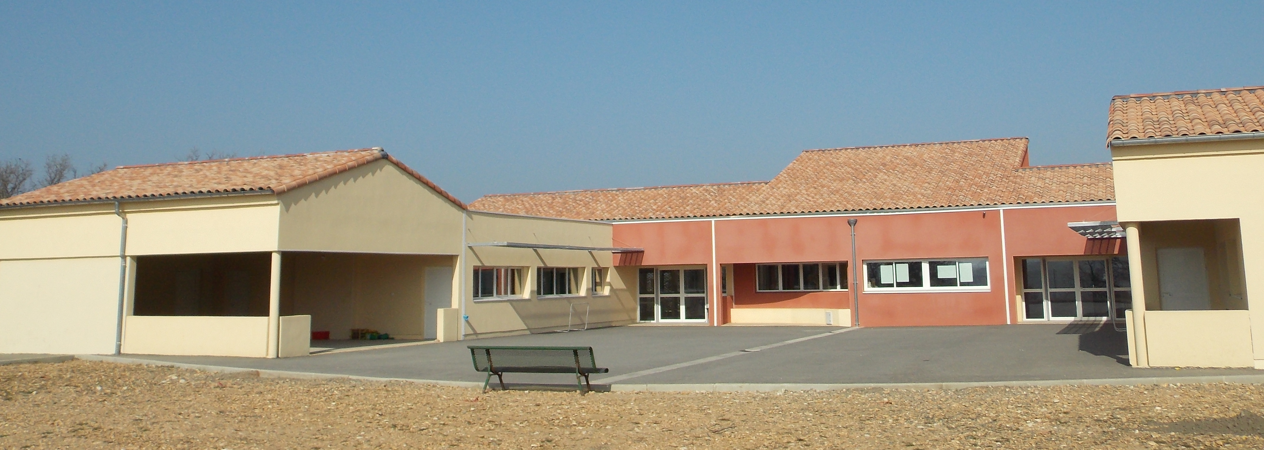 Ecole de Ners.